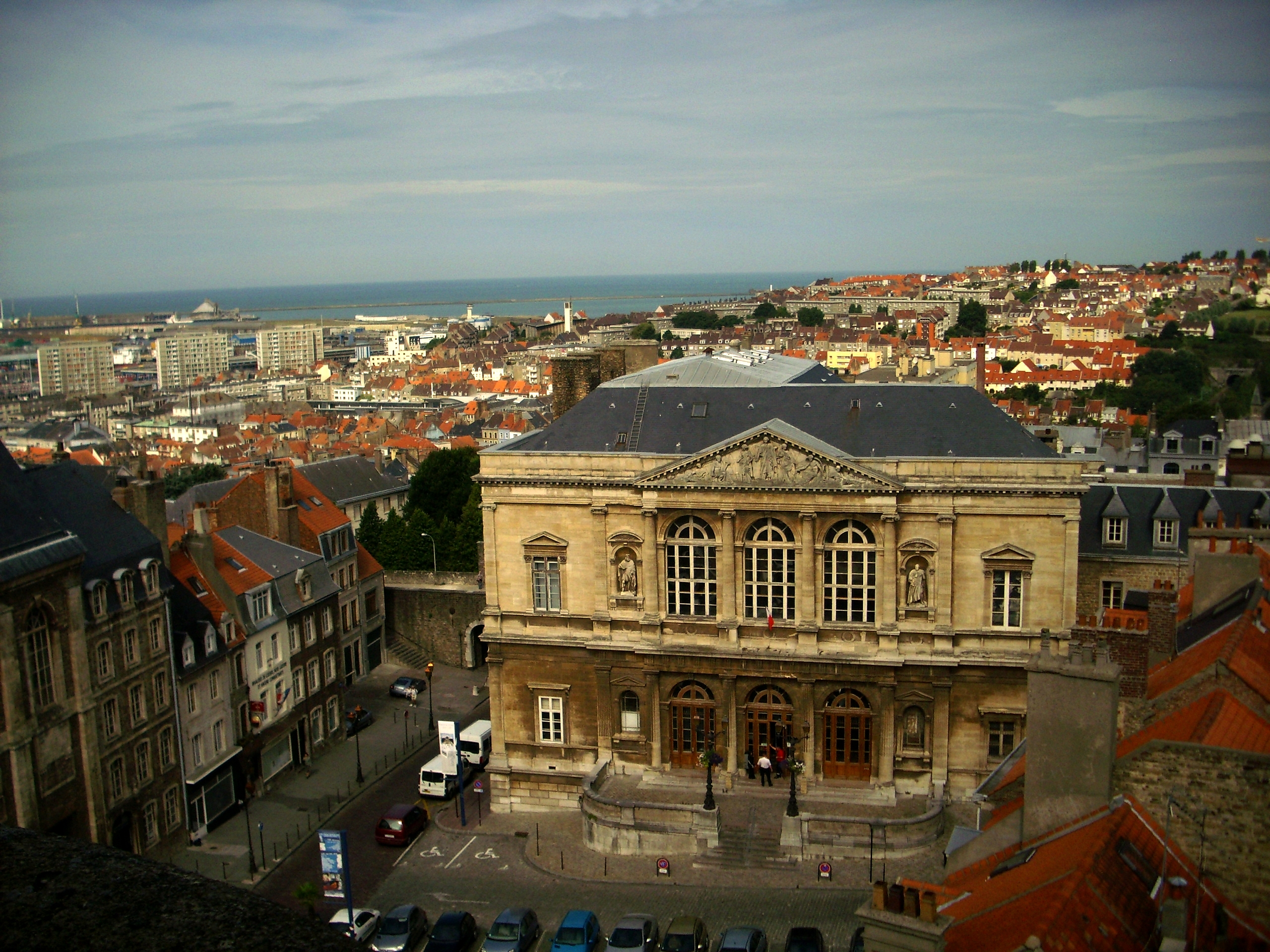 Palais de justice de Boulogne-sur-Mer vanaf de toren van de ((Belfort))